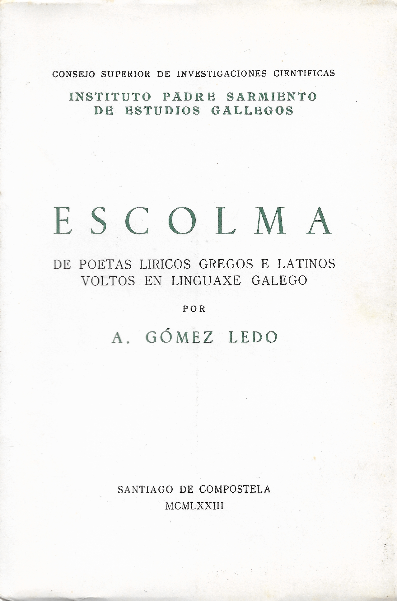 Portada da primeira edición de 'Escolma de poetas líricos gregos e latinos voltos en linguaxe galego', por Avelino Gómez Ledo